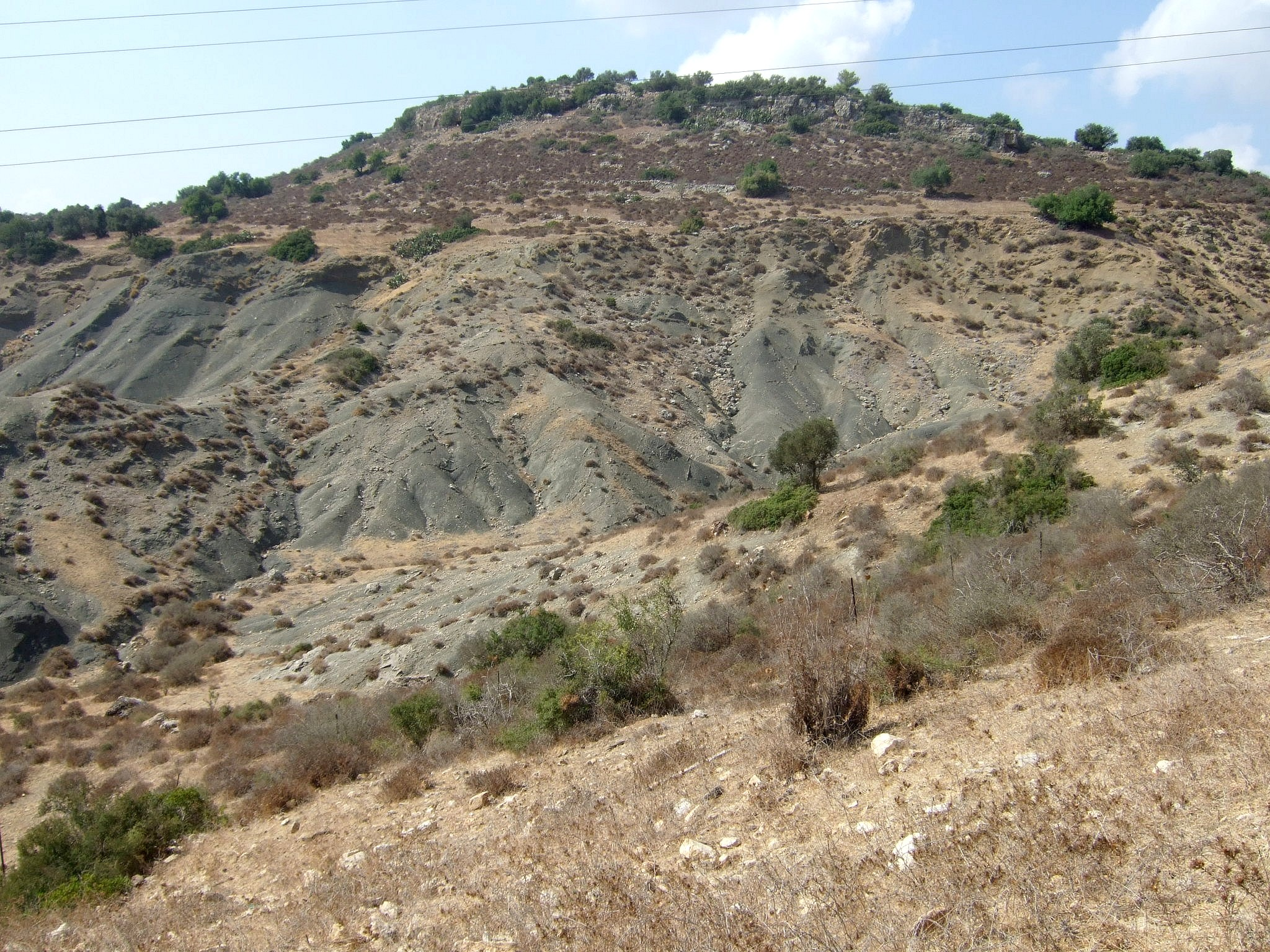 שמורת הטוף של הר הגעש הכבוי בכרם מהר"ל